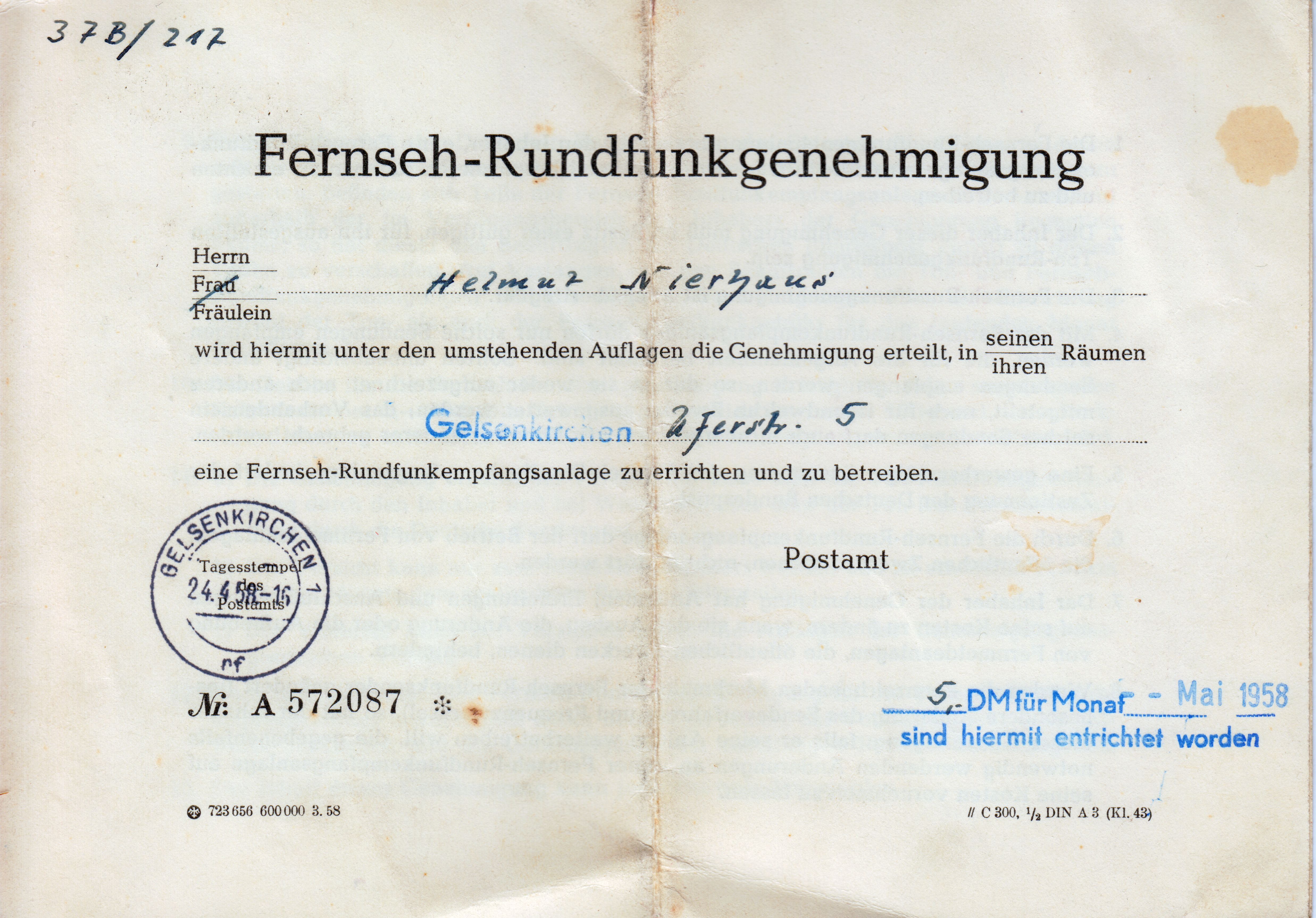 Einziehung der Fernseh-Rundfunkgenehmigung 1958